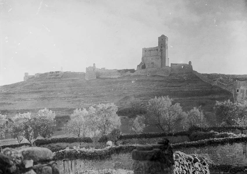 Imatge